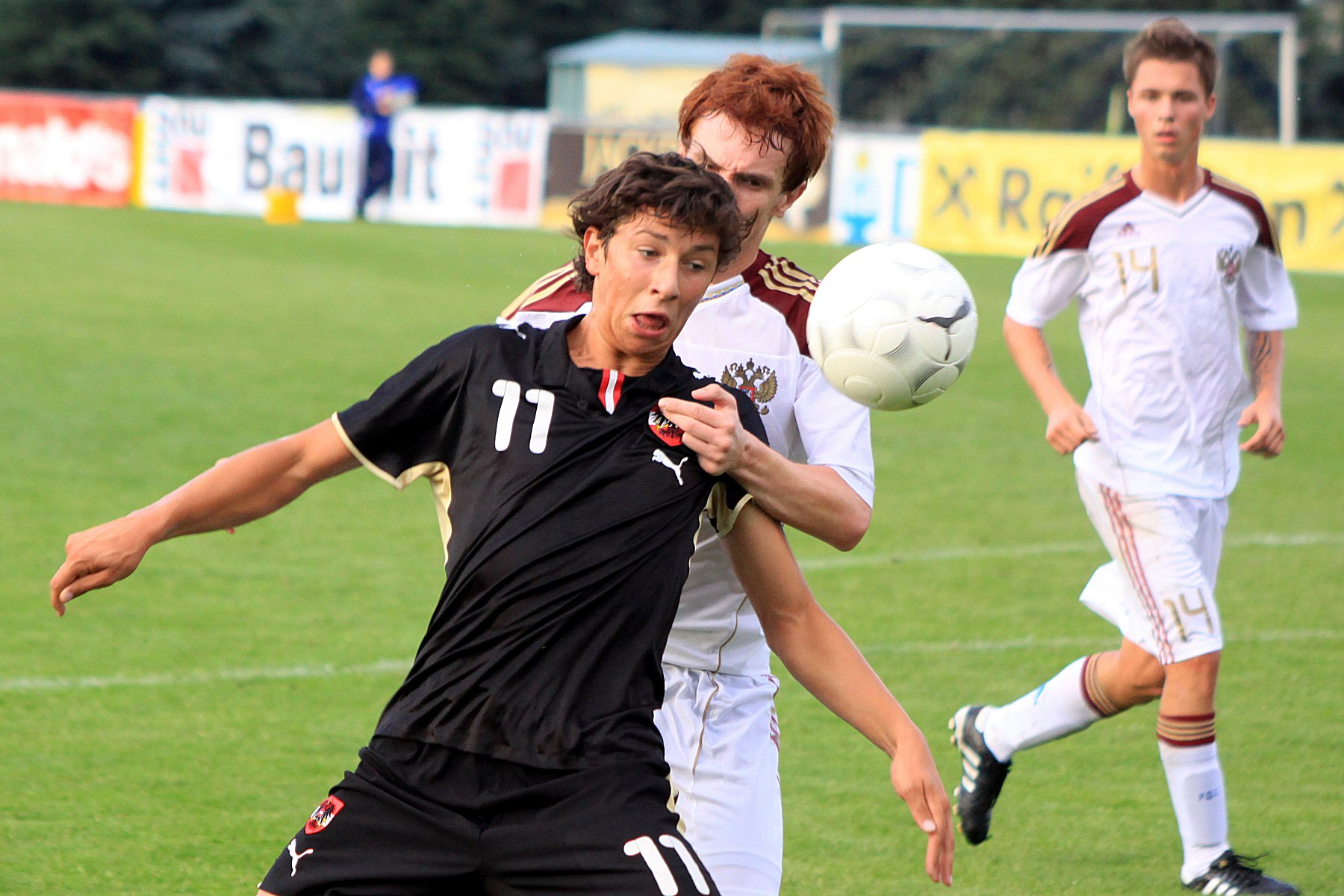 Robert Zulj (SV Ried) - Österreichische Fußballnationalmannschaft (U-19-Männer)